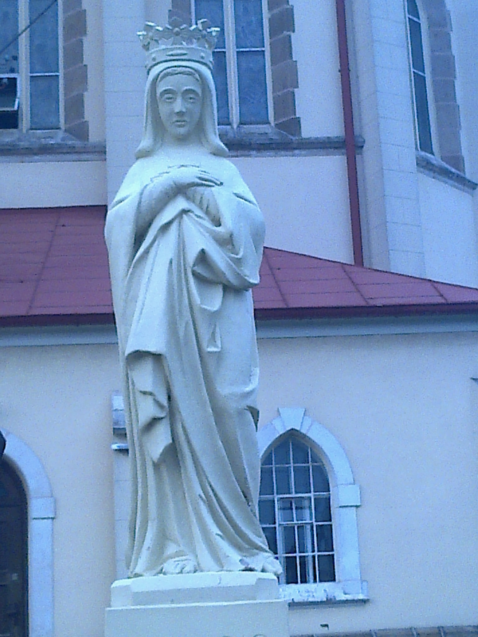 Kamienna statua Najświętszej Maryi Panny Królowej Korony Polskiej z 1910 r.